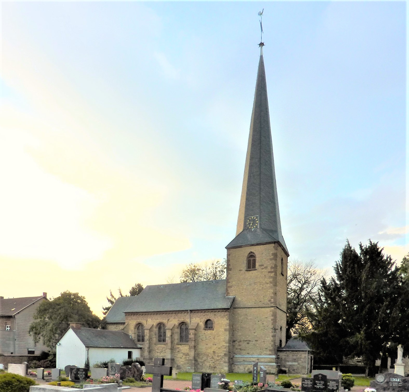 St. Gangolfus (Soller)